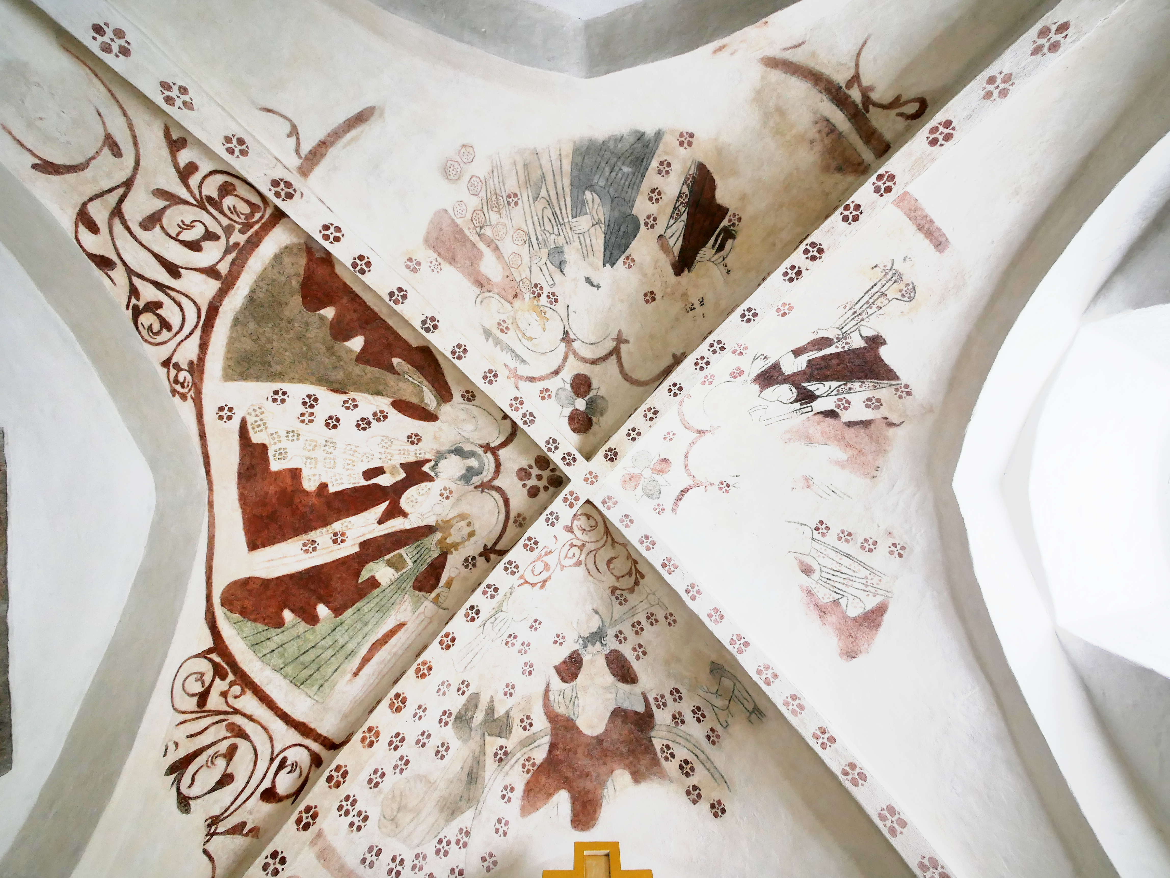 Oue Kirke - Fresken an der Decke des Chors